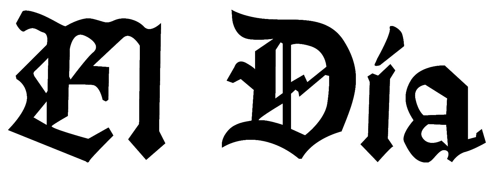 Logotipo del diario chileno El Día entre 1954 y 1977